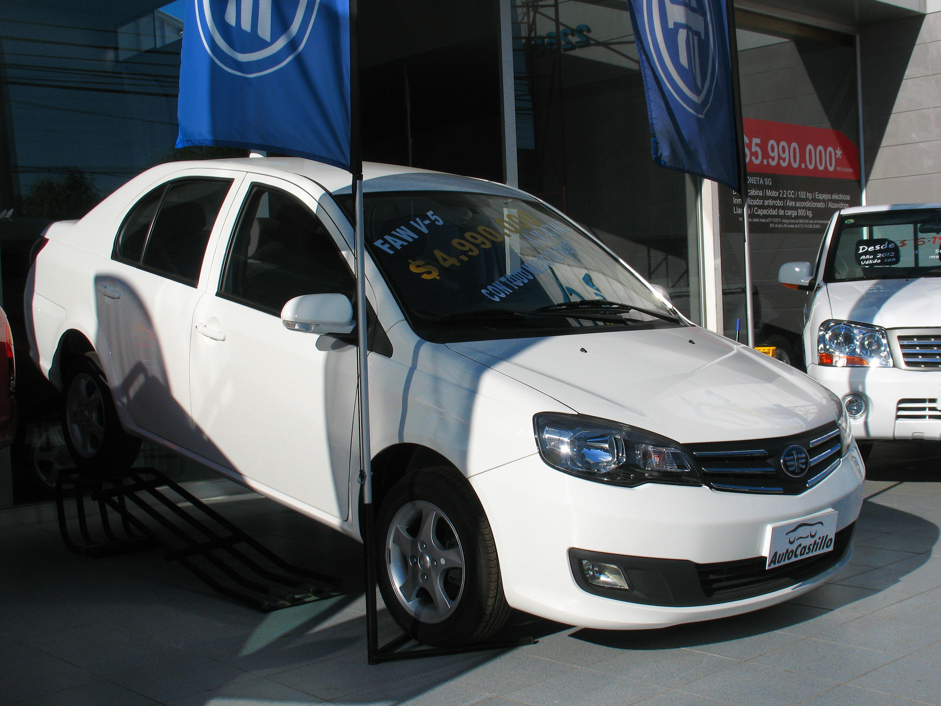 FAW V5 1.5 2014